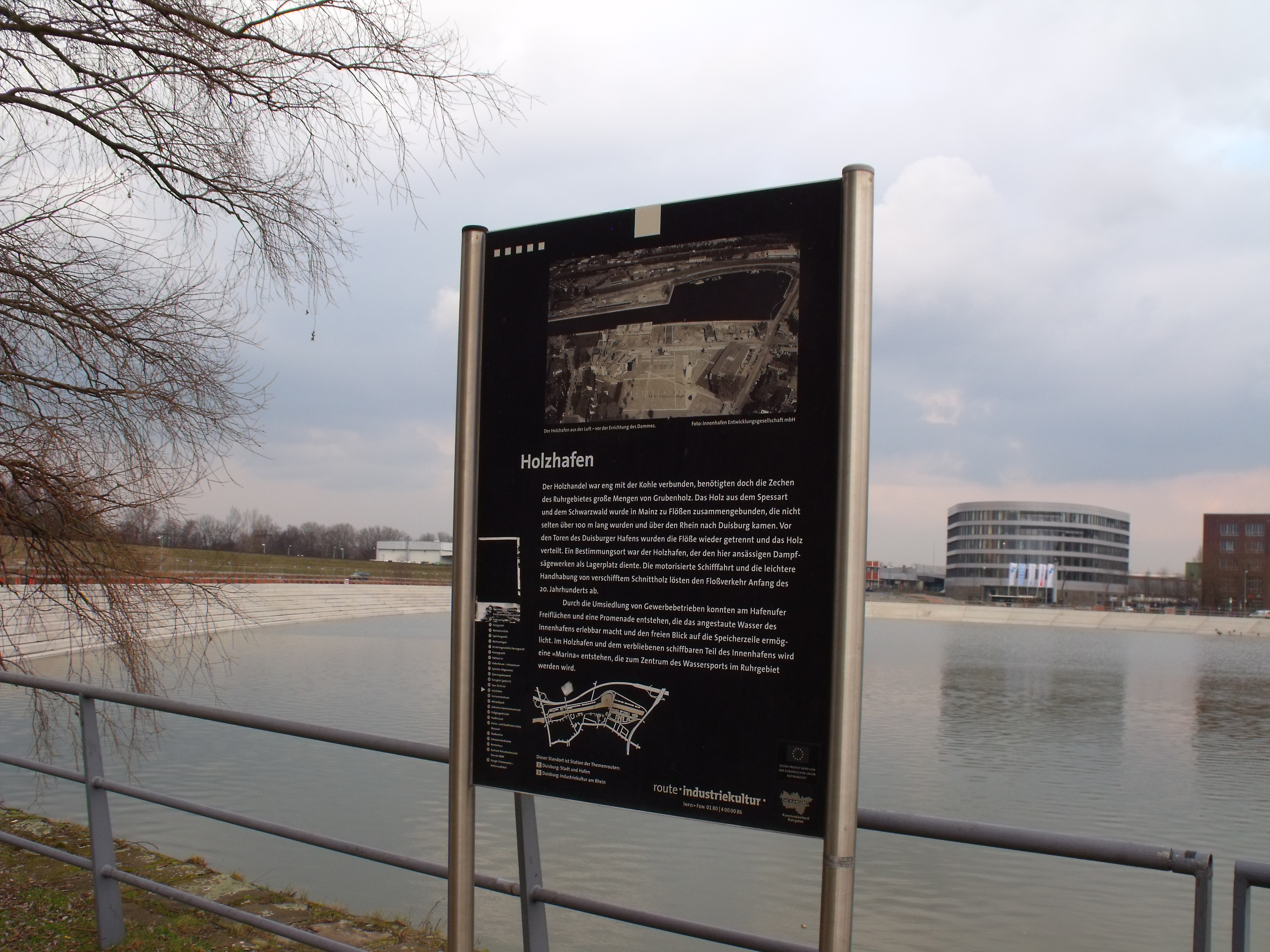 Informationstafel zur Route der Industriekultur im Duisburger Holzhafen